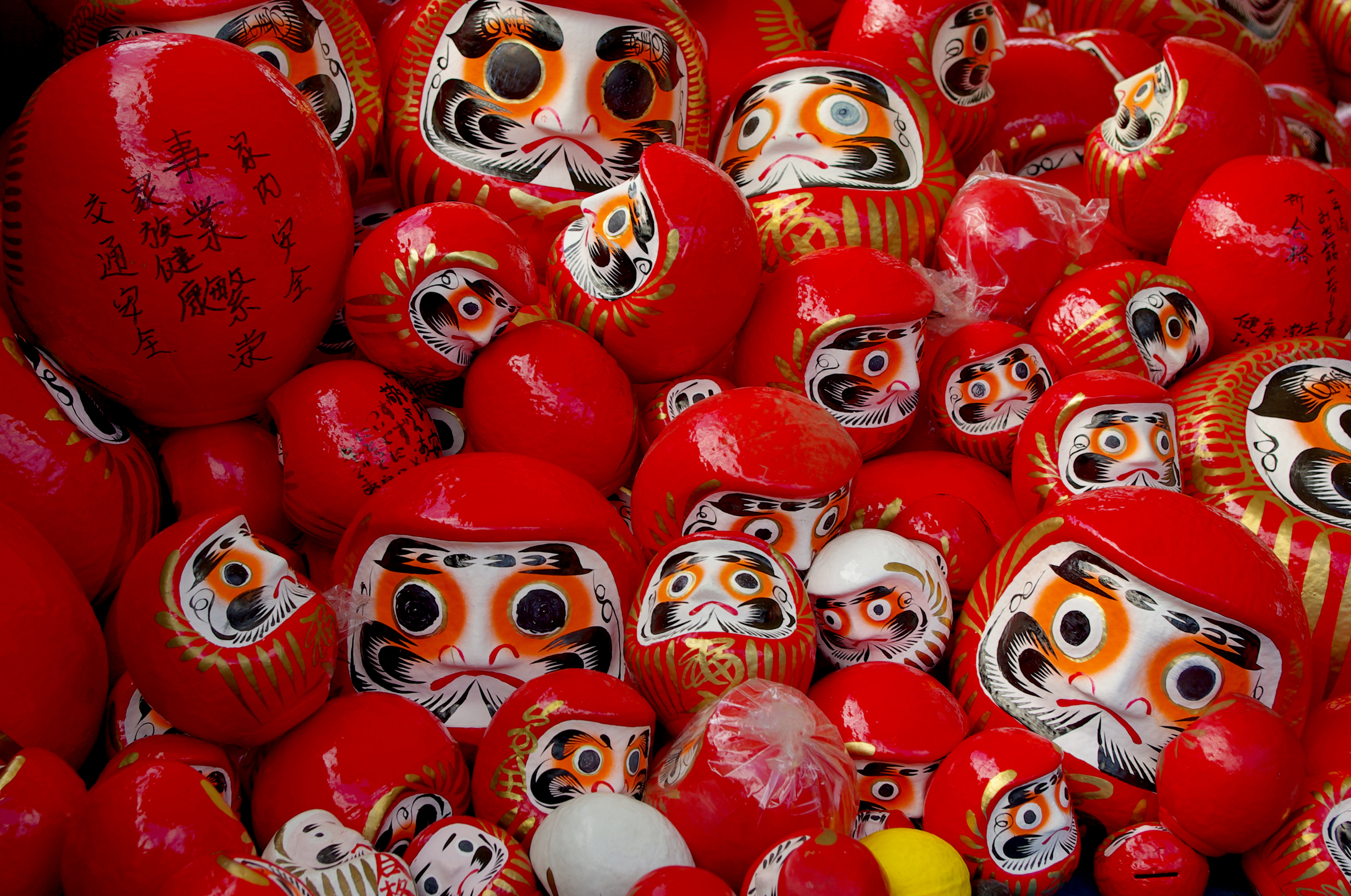 Daruma doll